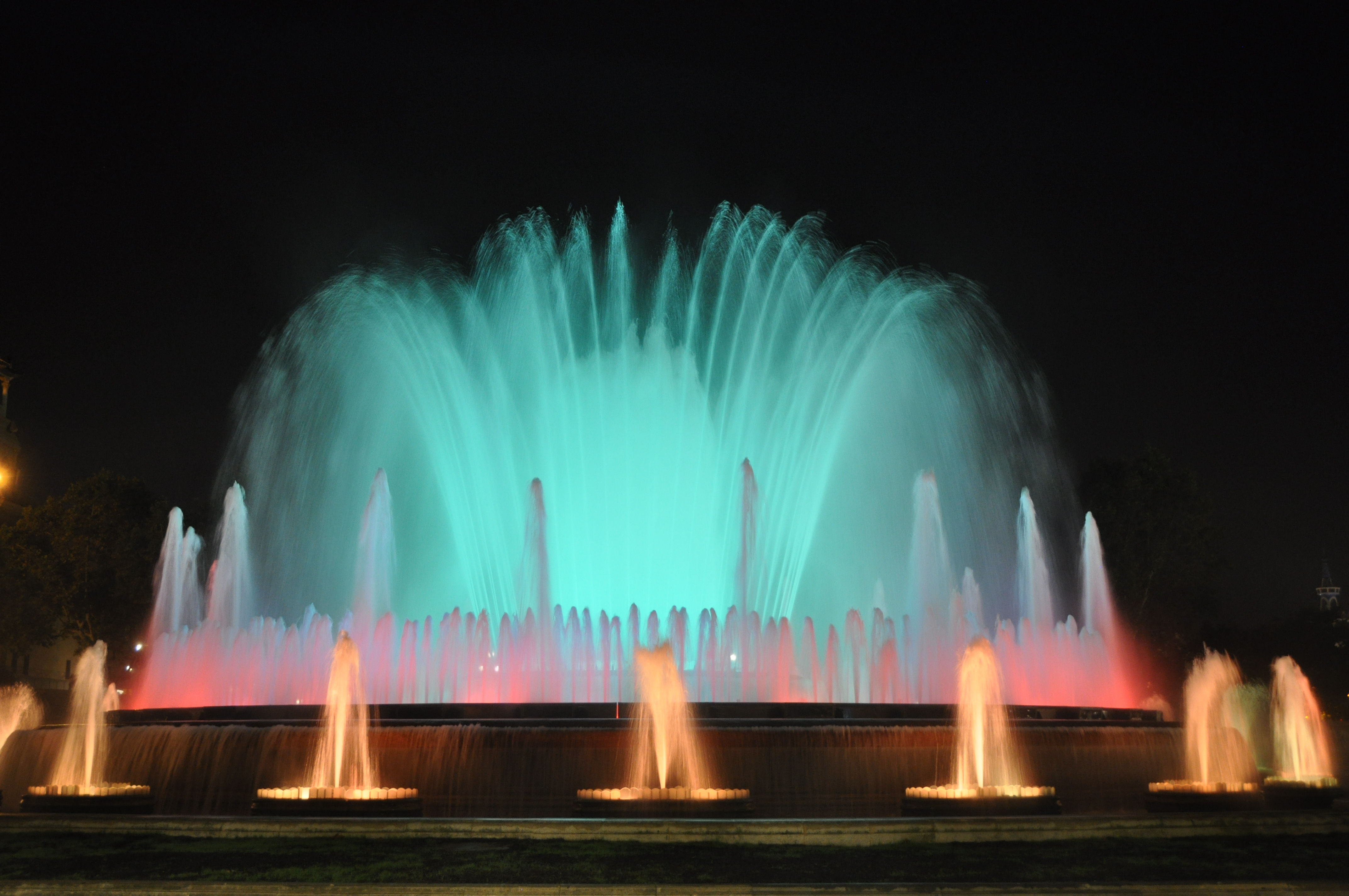 Barcelona, font màgica de Montjuïc, concebuda per Carles Buïgas, 1929